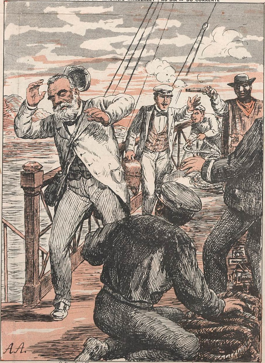 O Dr. José Marcellino alvejado pela garrucha do mulato Antonio Francisco, no momento em que se dirigia para a escada do vapor prestes a atracar na ponte da Companhia Bahiana.